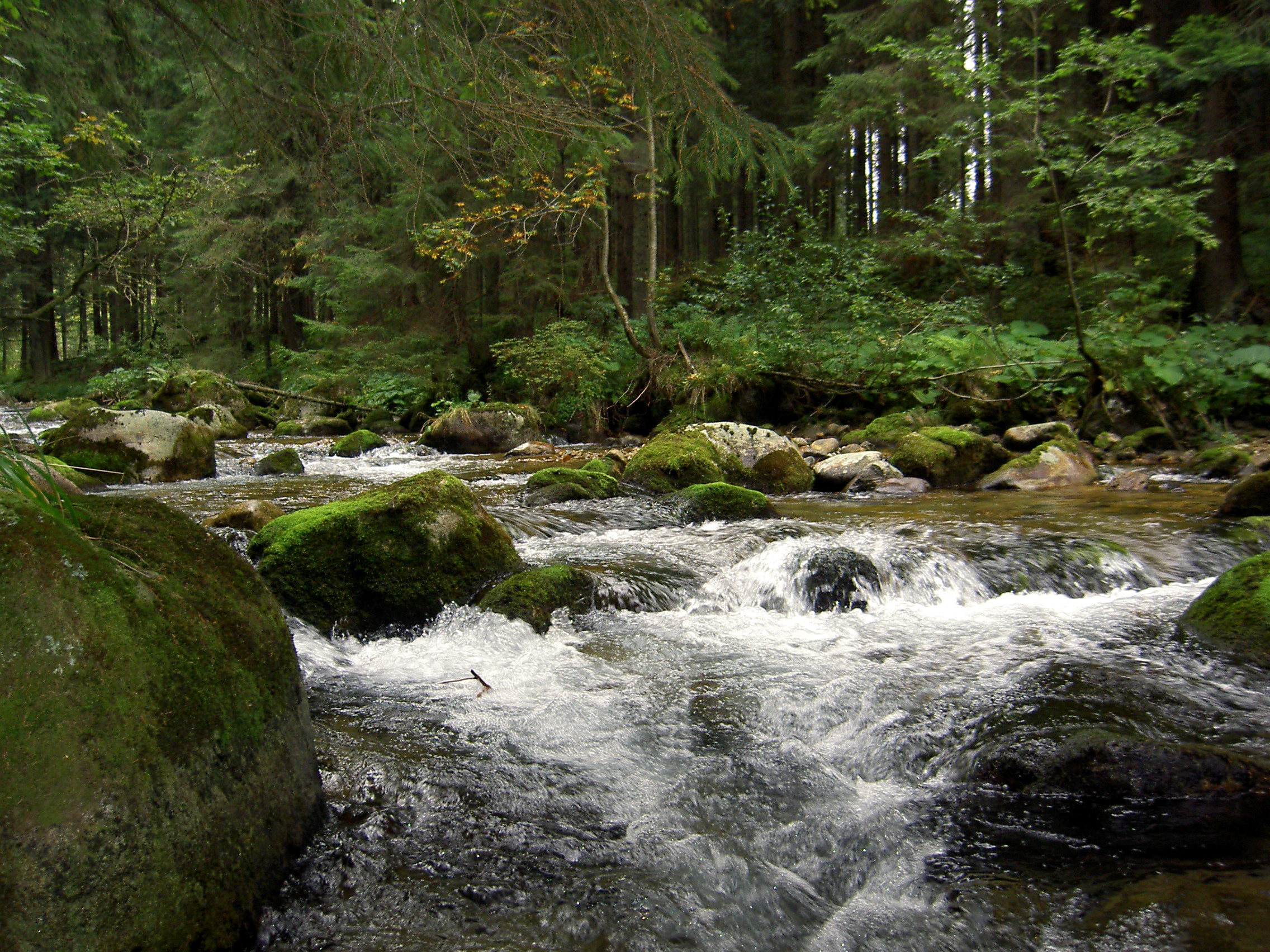 Studený potok mezi Brestovou (část obce Zuberec) a Zverovkou